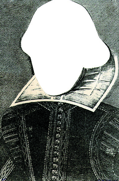 Рисунок Анатолия Васильевича Королёва